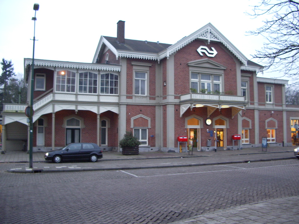 Baarn